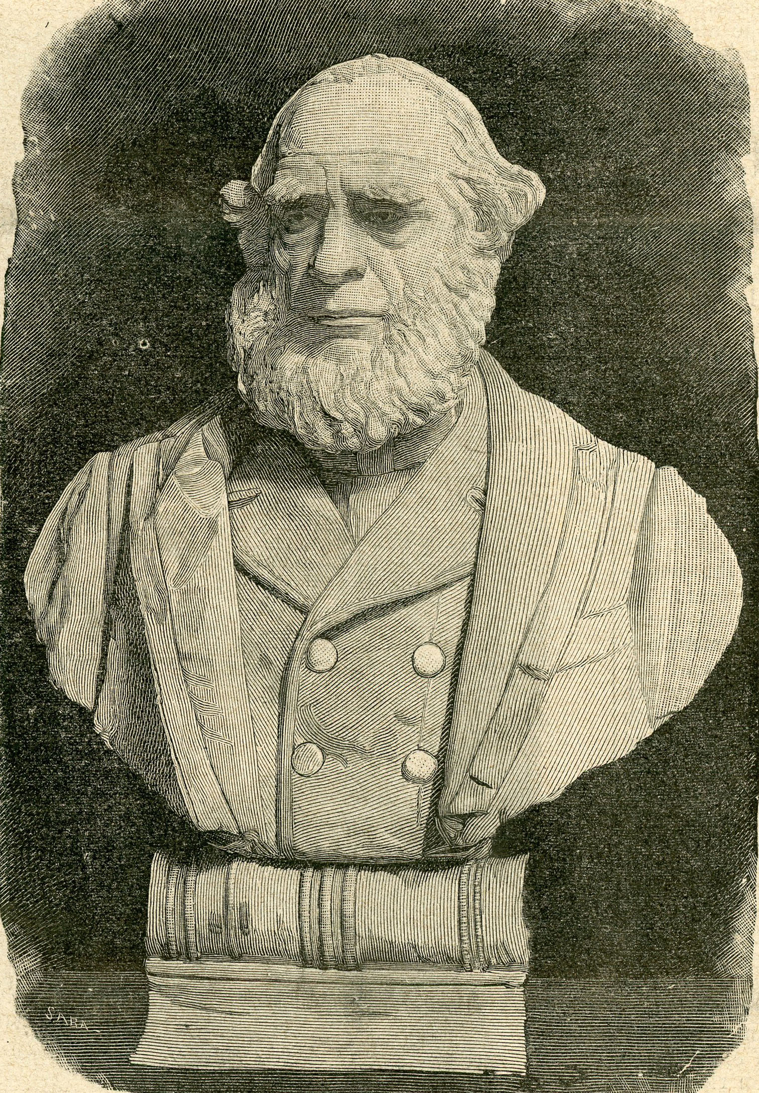 Senatore Giacomo Lacaita, morto a Napoli il 5 gennaio (busto di G. Matarrese).